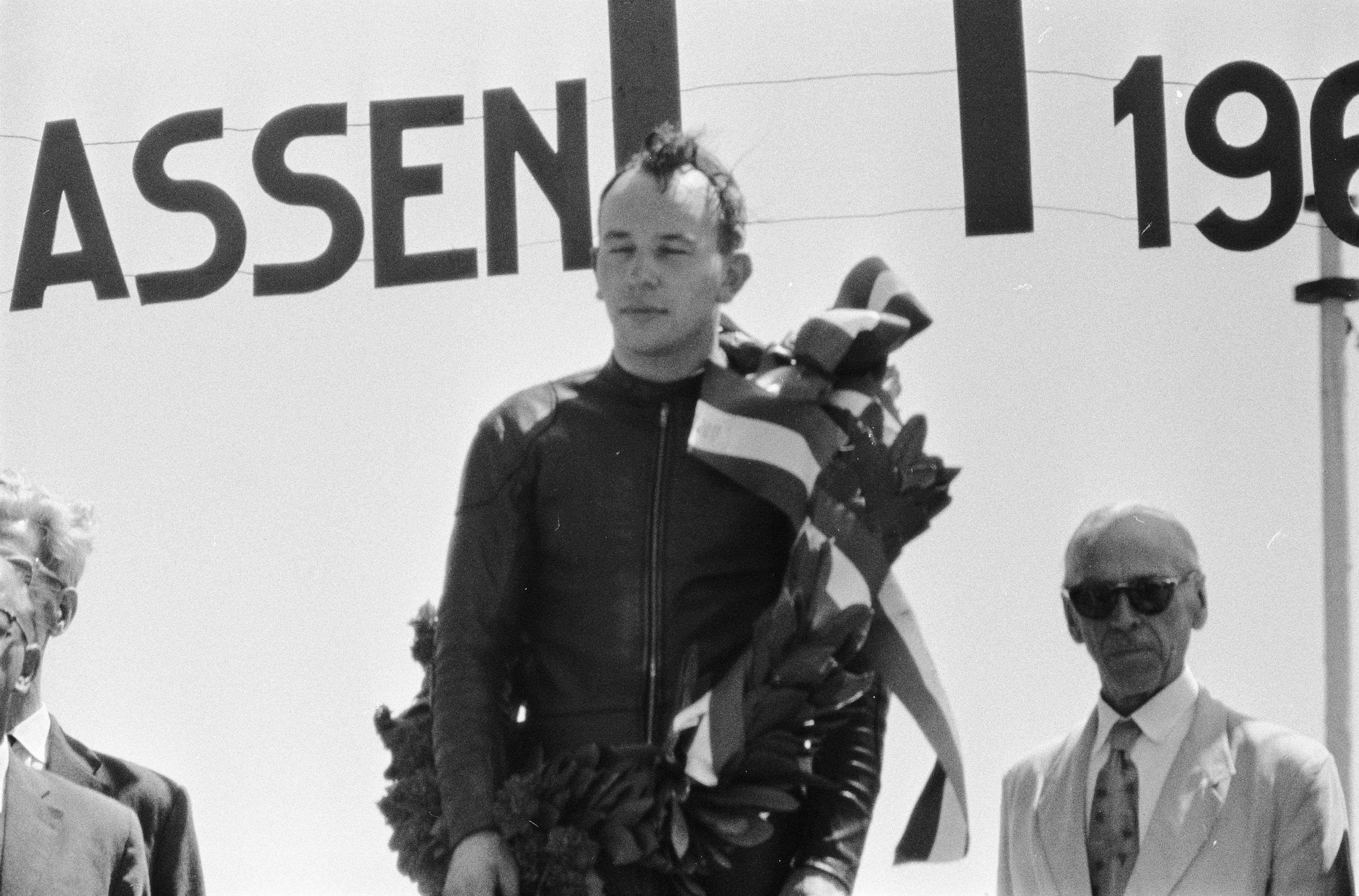 Collectie / Archief : Fotocollectie Anefo Reportage / Serie : TT Assen 1960 Beschrijving : Huldiging John Surtees (winnaar 350cc) Datum : 26 juni 1960 Locatie : Assen Trefwoorden : motorsport Persoonsnaam : Surtees, John Instellingsnaam : TT Fotograaf : Bilsen, Joop van / Anefo Auteursrechthebbende : Nationaal Archief Materiaalsoort : Negatief (zwart/wit) Nummer archiefinventaris : bekijk toegang 2.24.01.05 Bestanddeelnummer : 911-3656